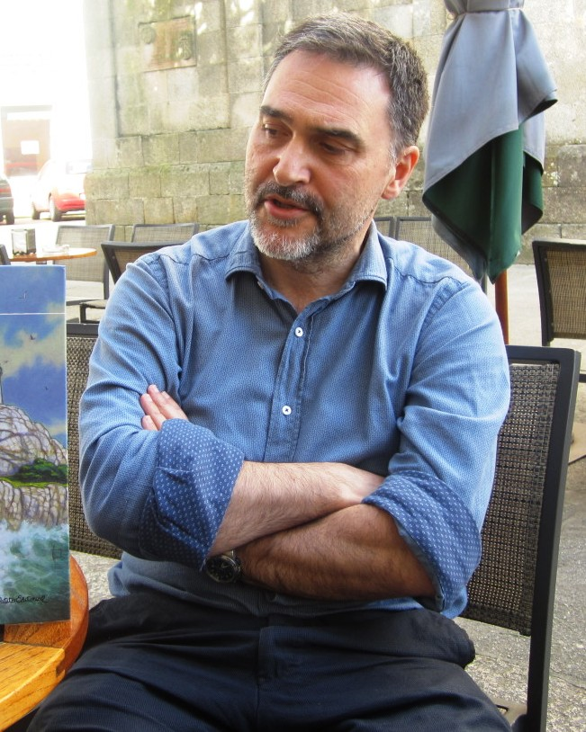 Miguelanxo Prado nunha entrevista no 2012.